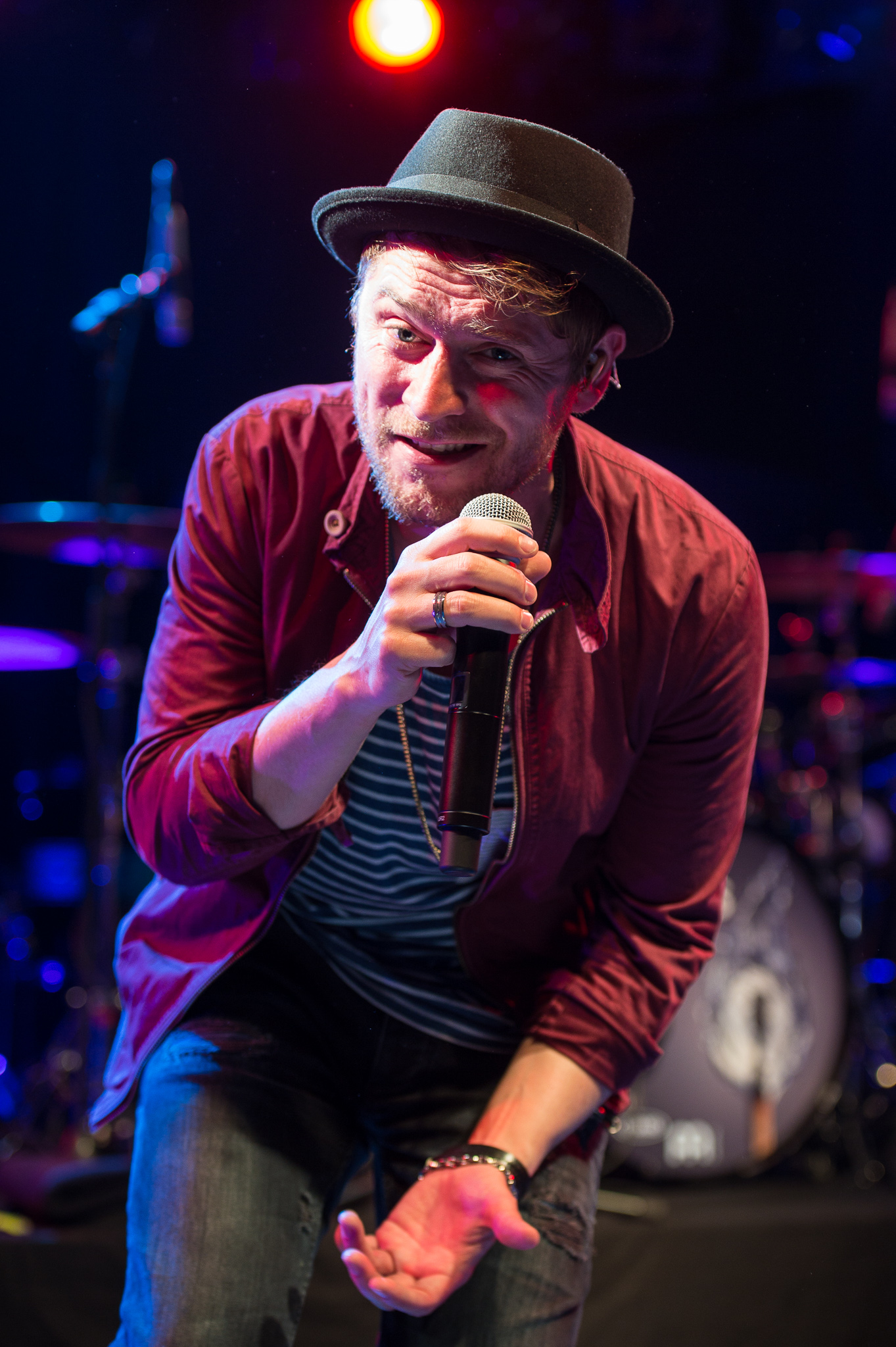 Concertbüro Franken,Der Hirsch,Johannes Oerding,Konzert,Livekonzert,Livemusik,Musik